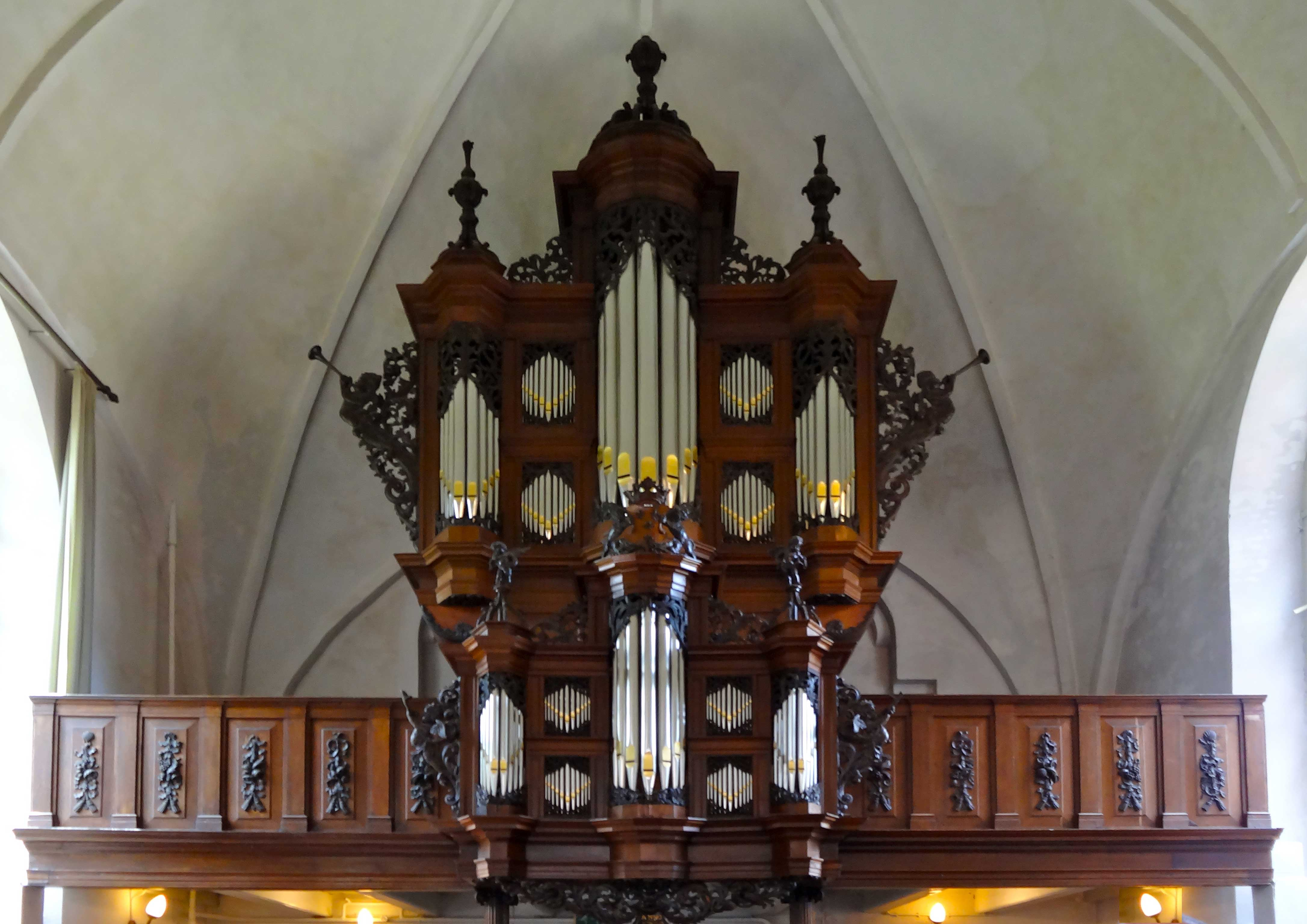 Kerk van Uithuizen (orgel)